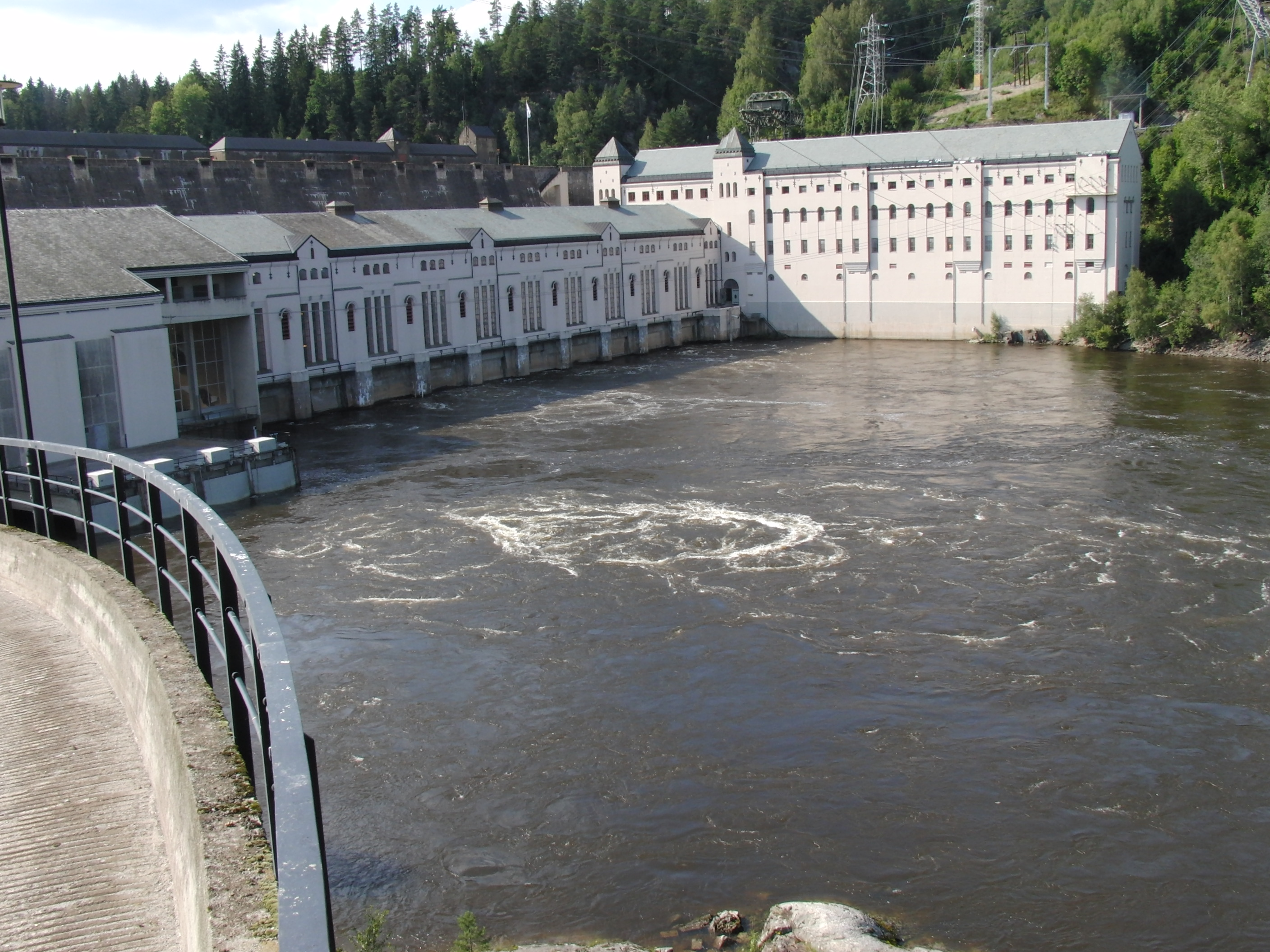 Vamma kraftstasjon